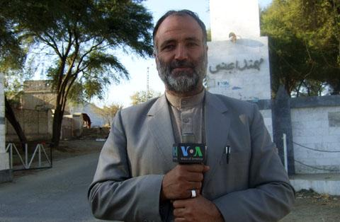 2012年1月17日在巴基斯坦被枪杀的美国之音光明电台(VOA Deewa Radio)记者阿提夫(Mukarram Khan Aatif)。